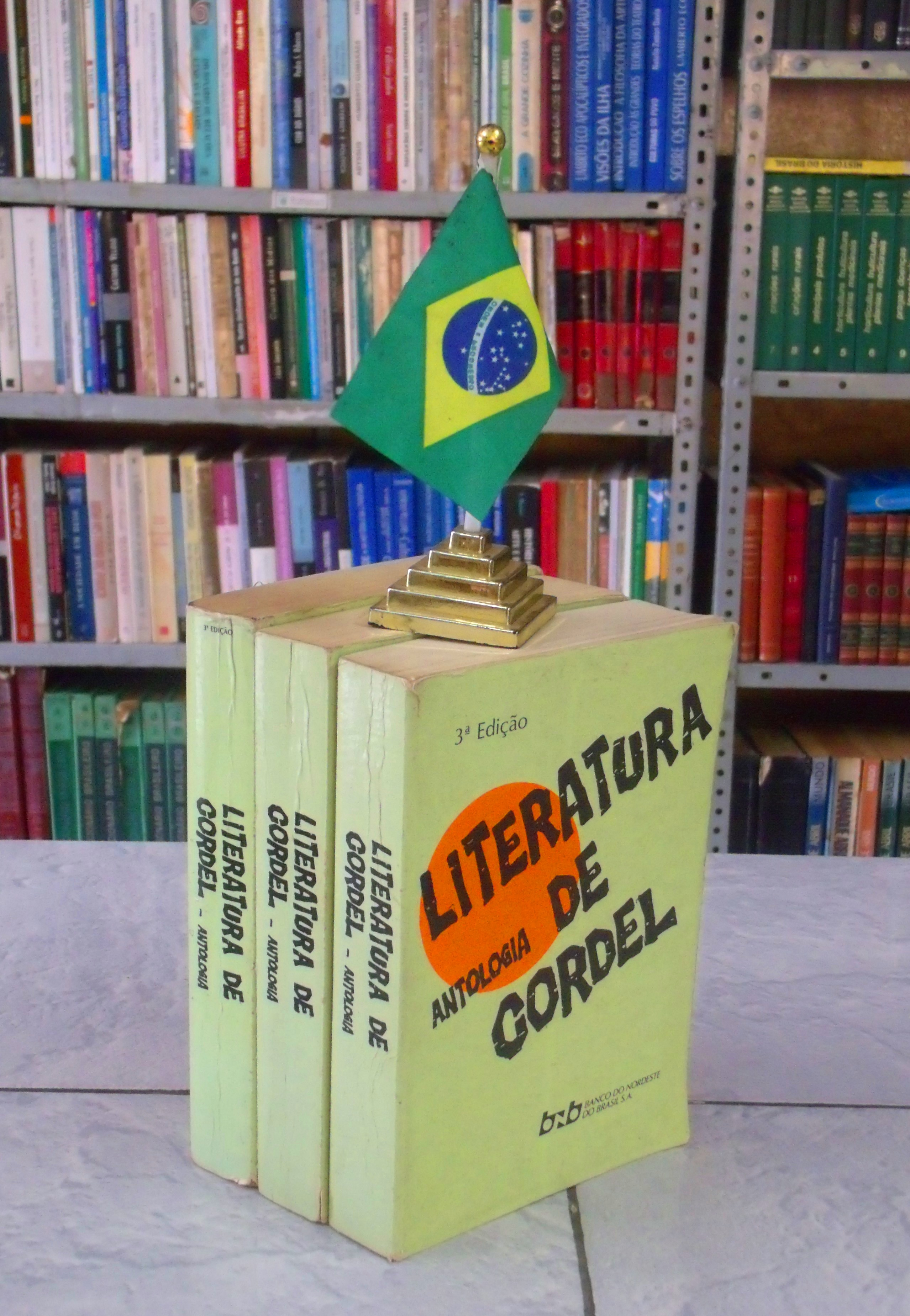 Antologia de Literatura de Cordel publicada pelo banco do Nordeste do Brasil em 1984. Na imagem é uma exposição numa biblioteca pública.